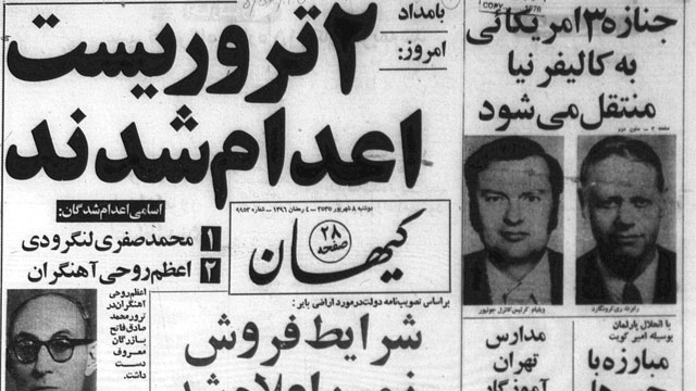 بریده‌ای از روزنامهٔ کیهان. تاریح: ۸ شهریور ۱۳۵۵